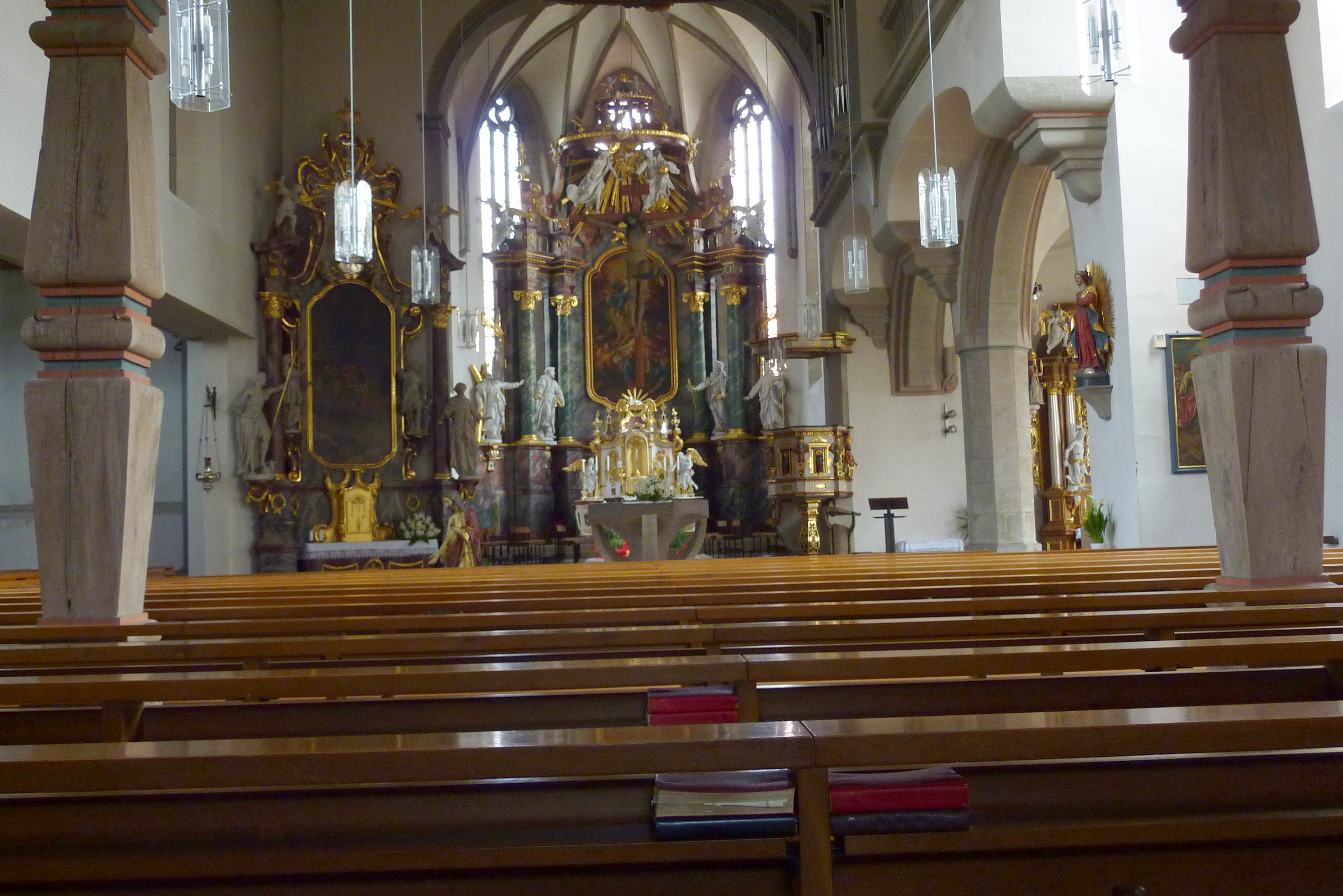 katholische Stadtpfarrkirche St. Peter und Paul in Grünsfeld im Main-Tauber-Kreis (Baden-Württemberg), Hauptstraße 18